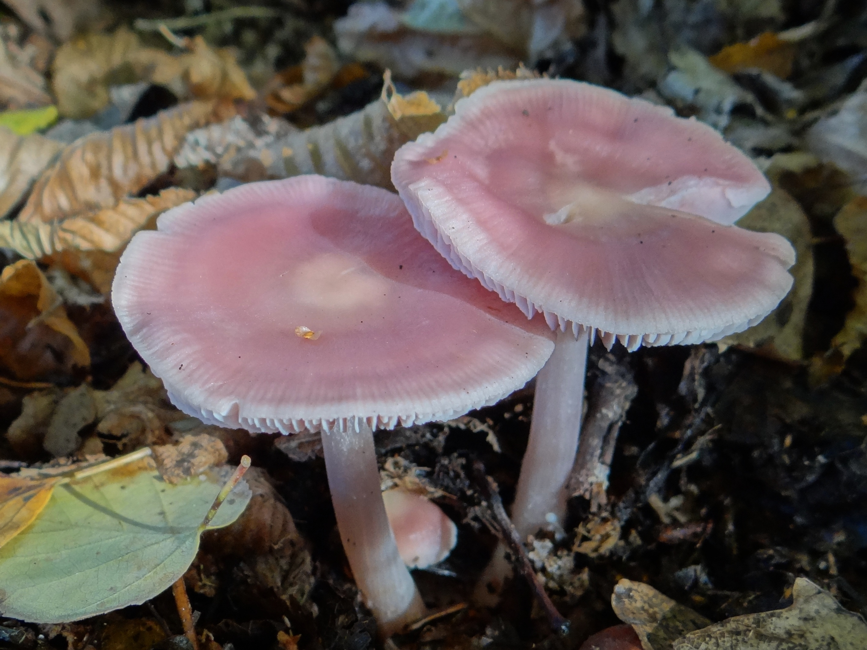 Mycena rosea